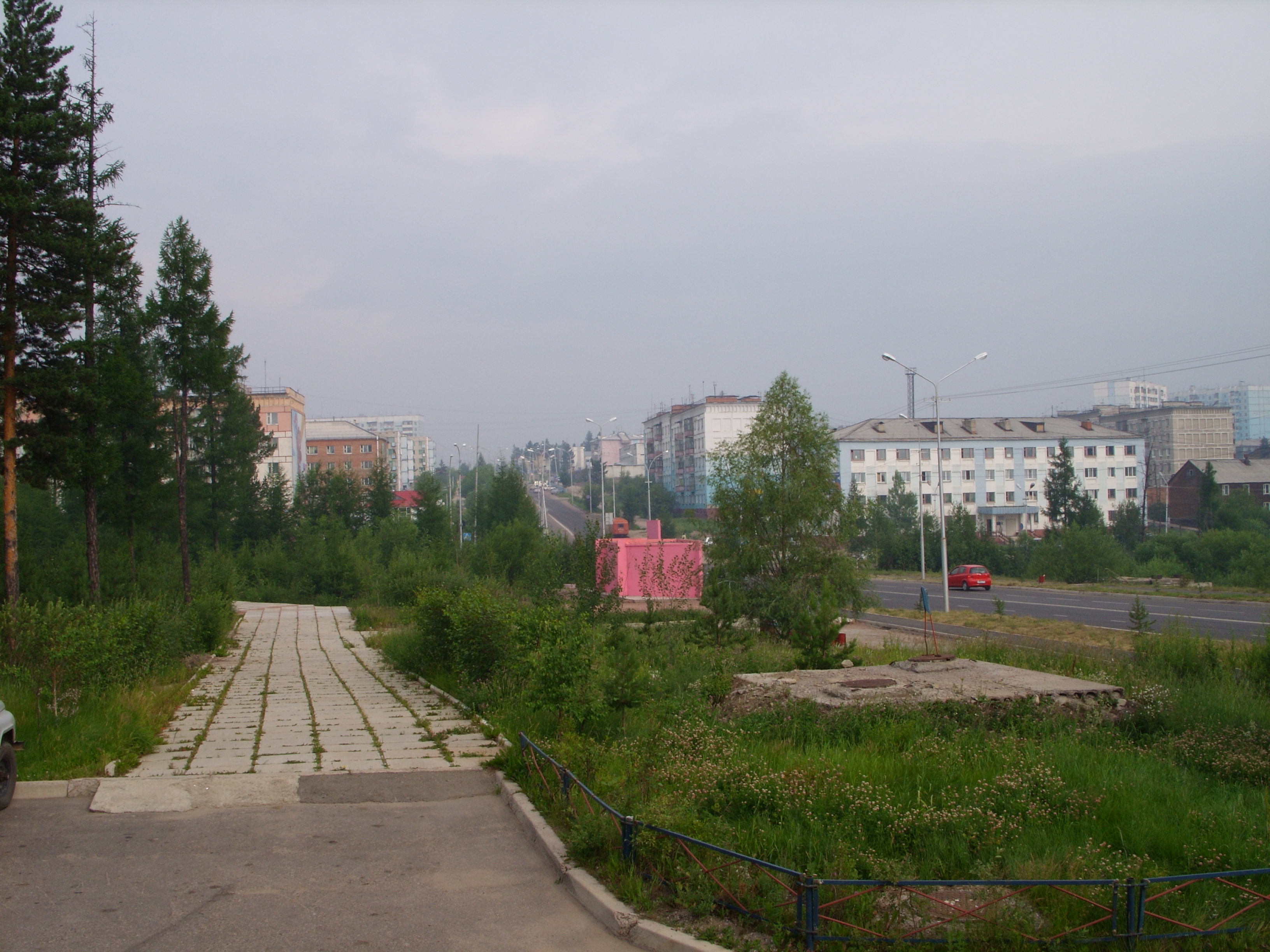 снимки июля 2008 г.